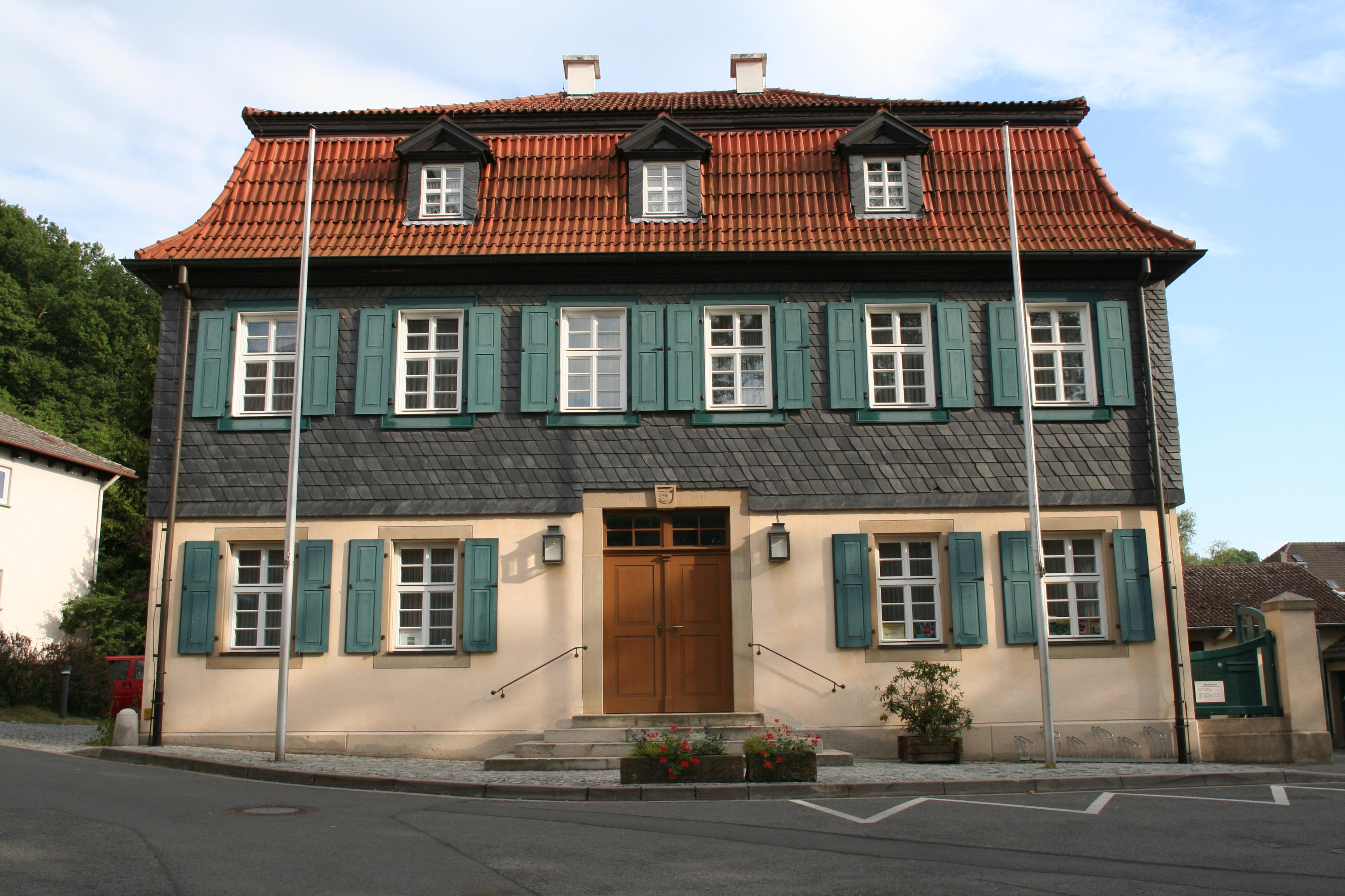 Rathaus in Niederfüllbach in Oberfranken Landkreis Coburg